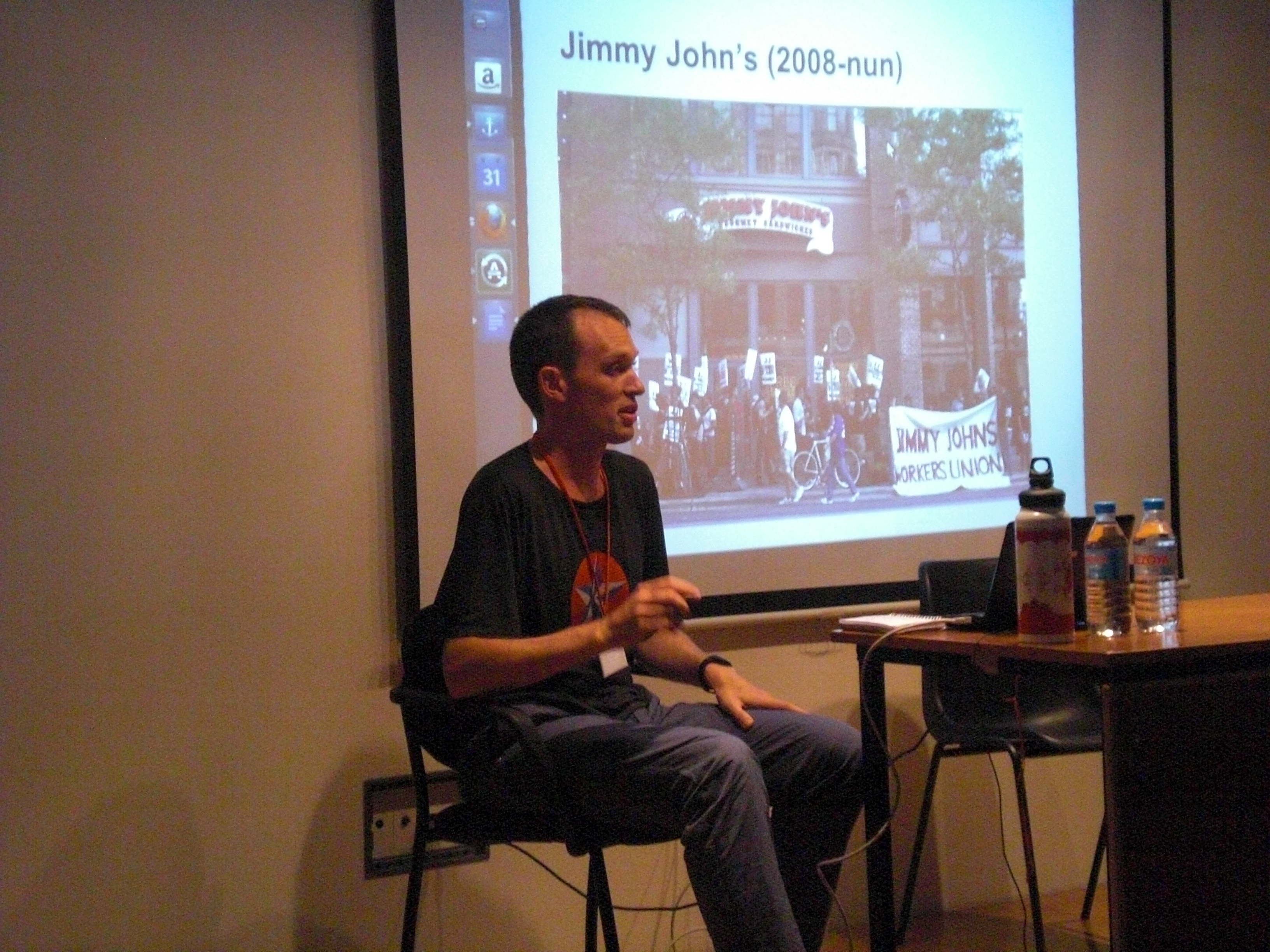 Prelego de Brandon Sowers pri “Lastatempaj sociaj luktoj en Usono kaj ilia historia kunteksto”.